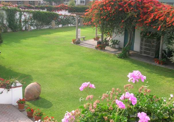 Jardin de Museo Larco